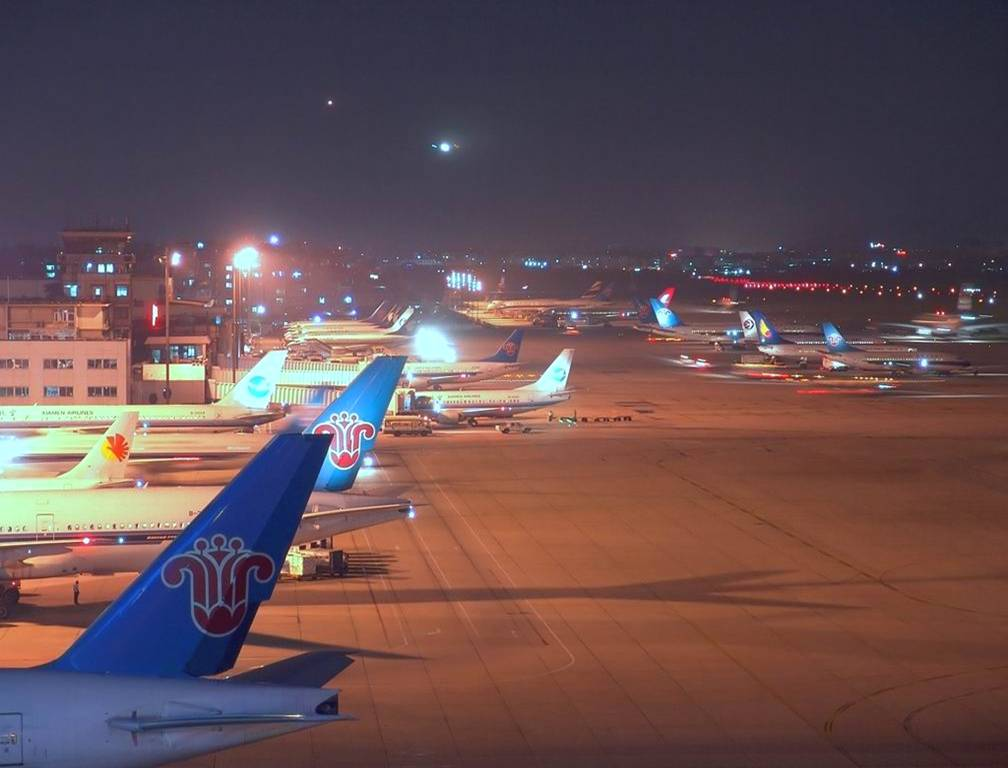 中文（中国大陆）: 搬迁前的广州白云国际机场的夜景，繁忙的老白云机场此时已经不堪重负。